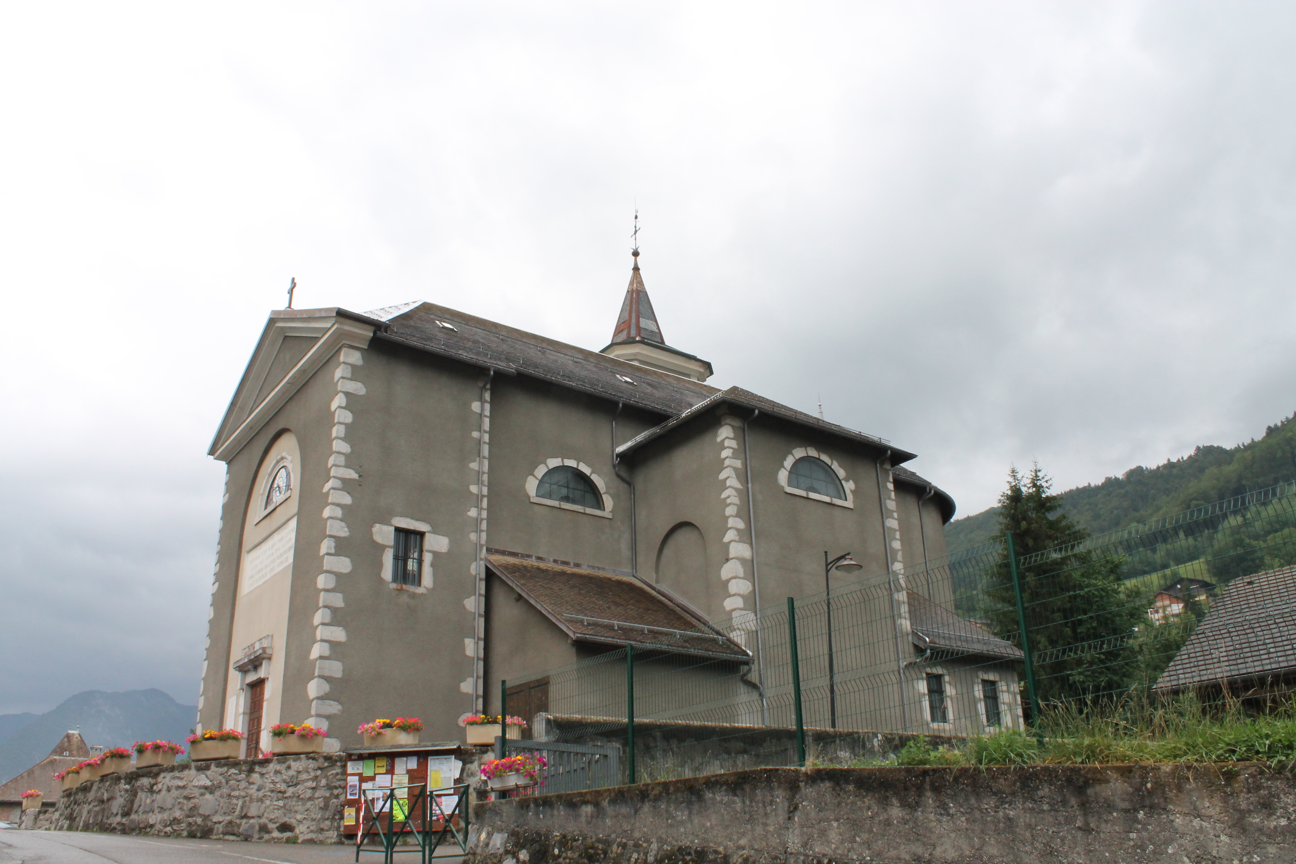 Vue du profil de l'église Saint-Nicolas des Clefs (XIXe siècle), depuis la mairie